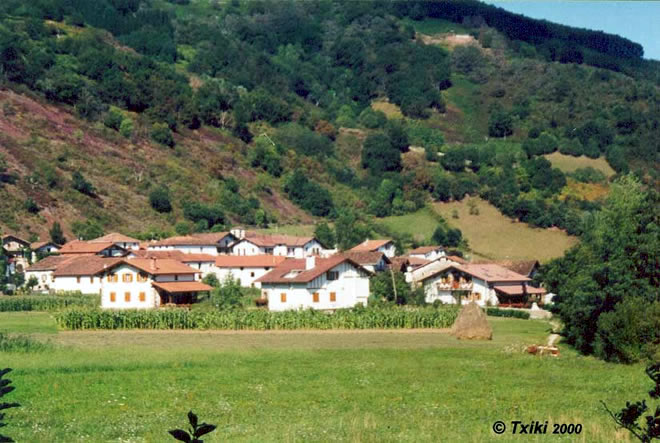 Vue du village d'Elgorriaga Pyrénées).